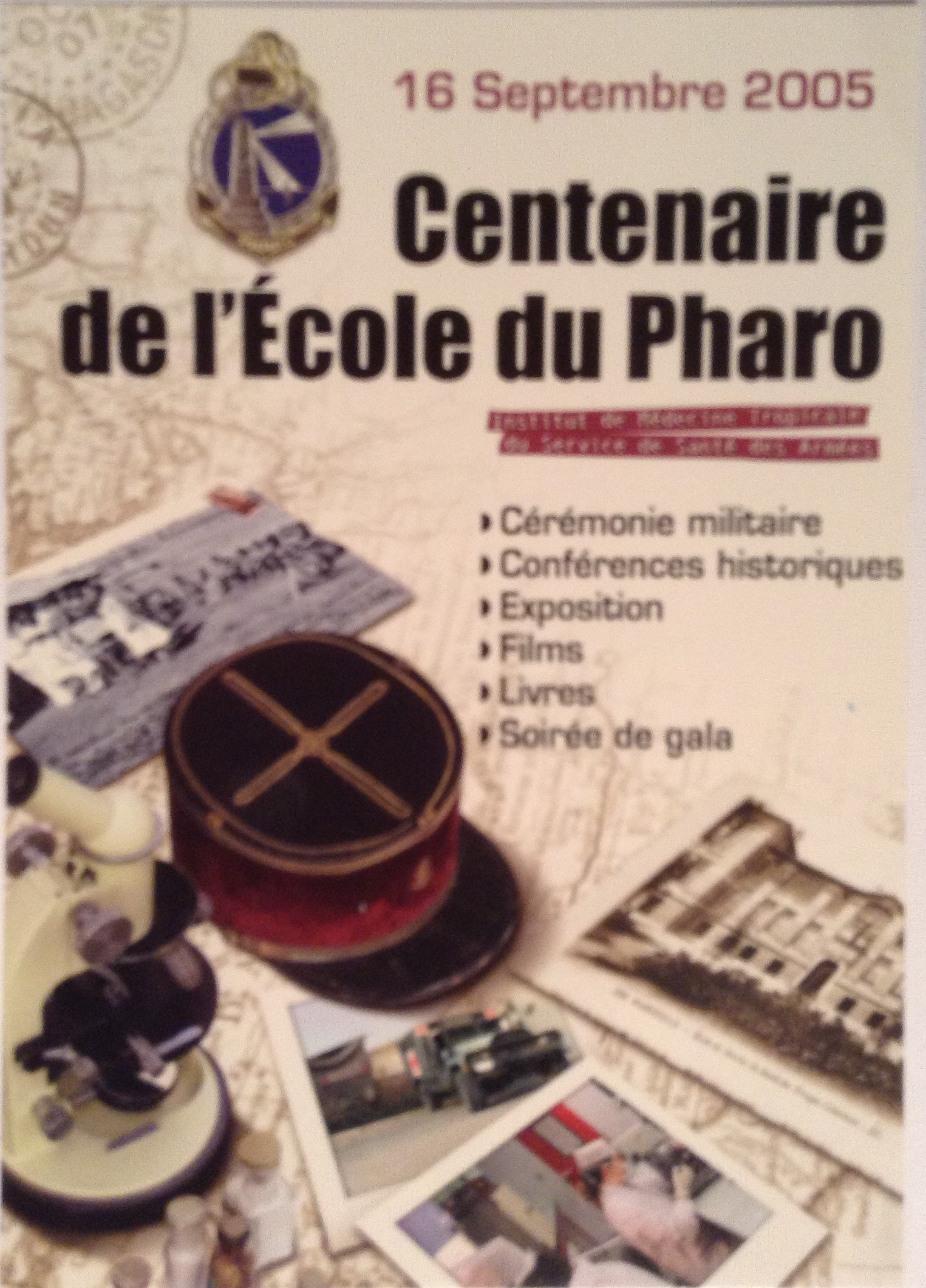 Affiche du Centenaire de l'Ecole du Pharo